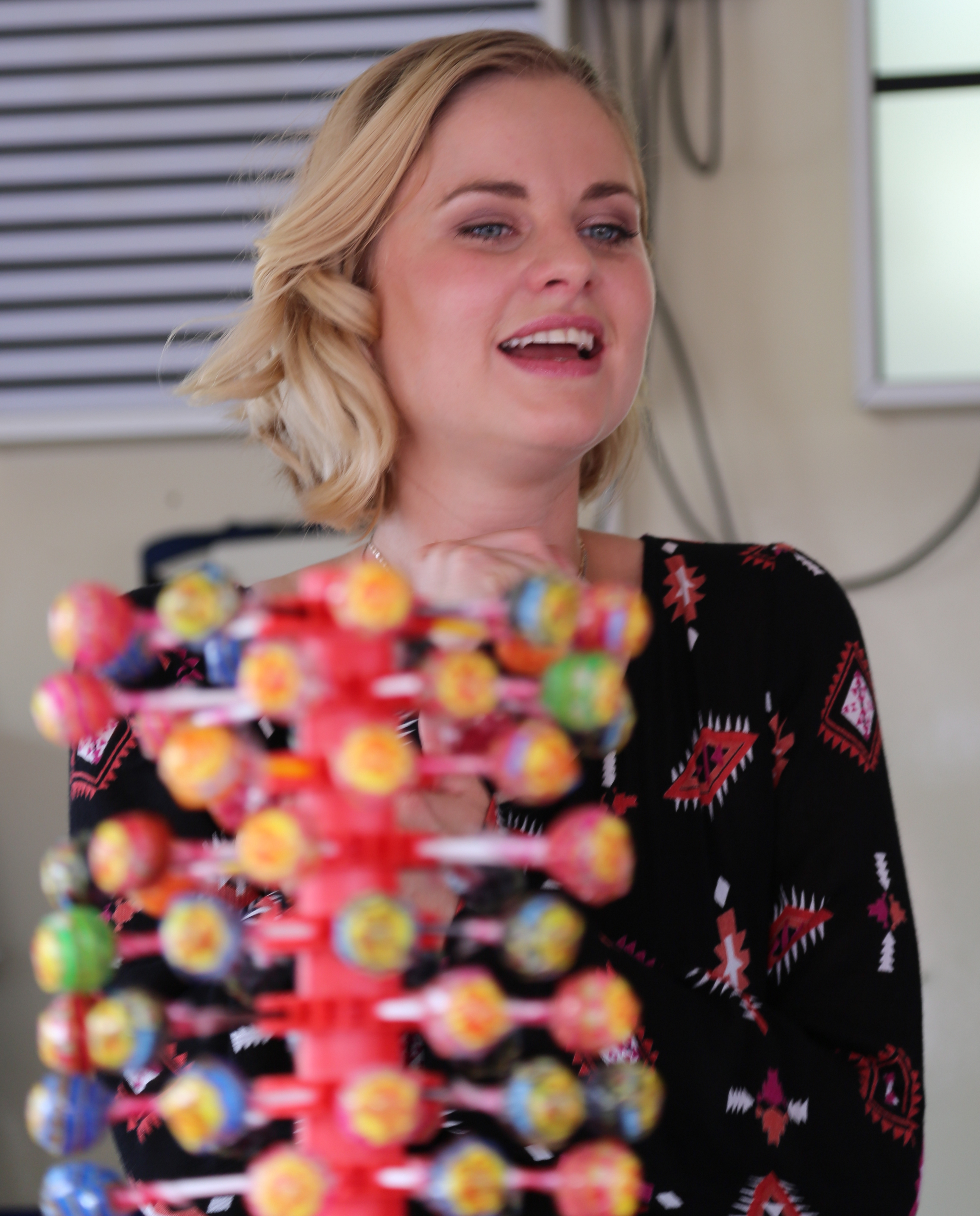 Henrike Fehrs beim "Rote Rosen"-Fantag 2017, am 18.06.2017 in Lüneburg.